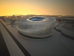 Juzgados de lo Civil del Campus de la Justicia